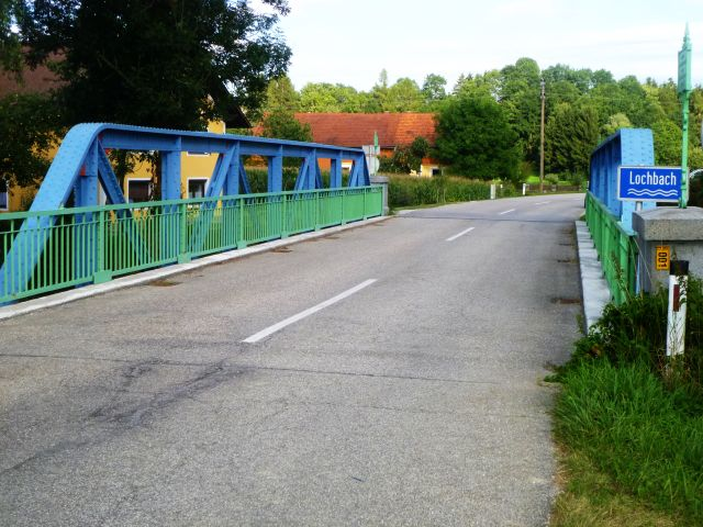 Lochbachbrücke